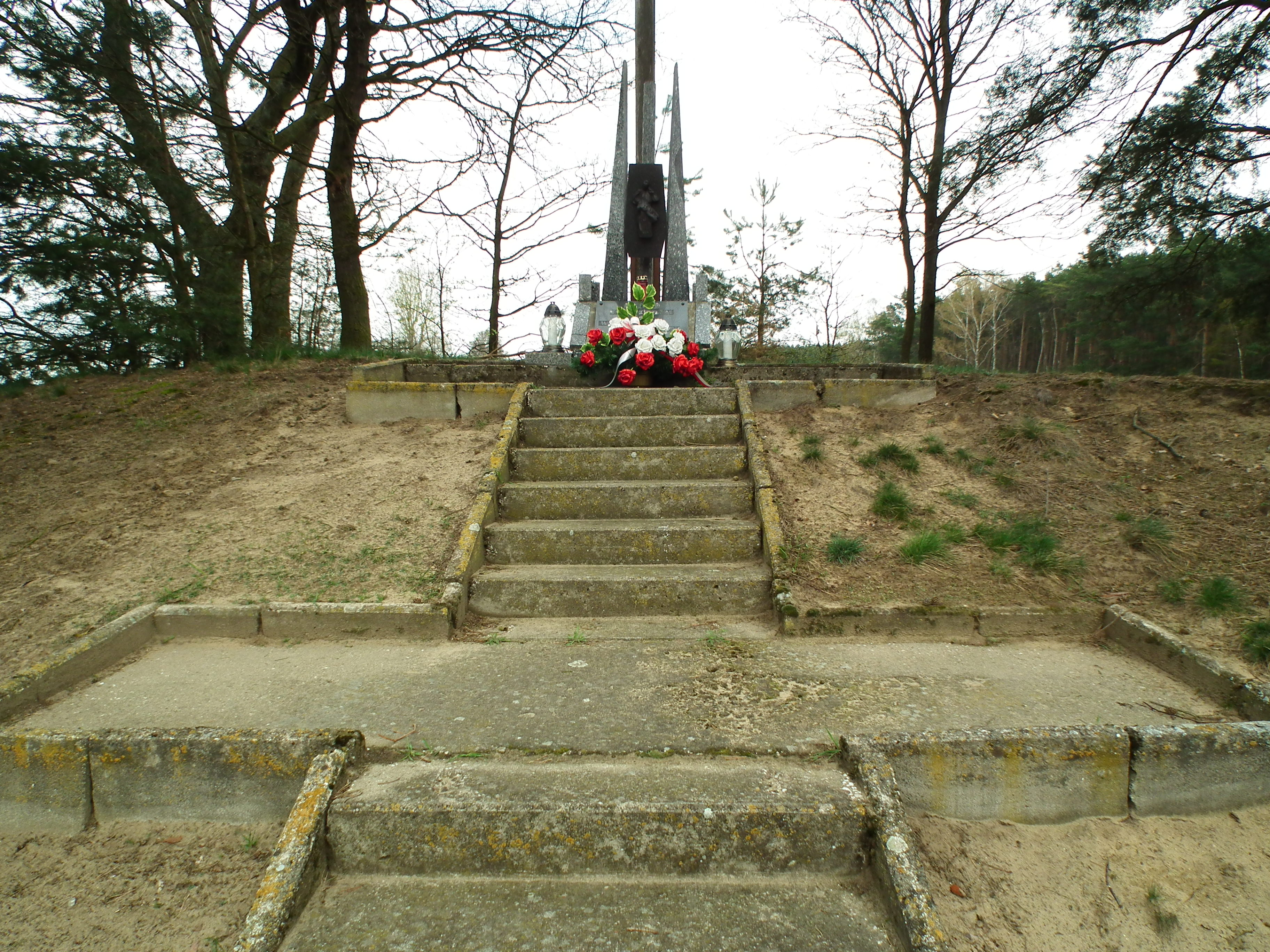 Mogiła powstańców styczniowych w Myszakowie, gm. Zagórów.